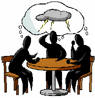 Imatge de pluja d'idees